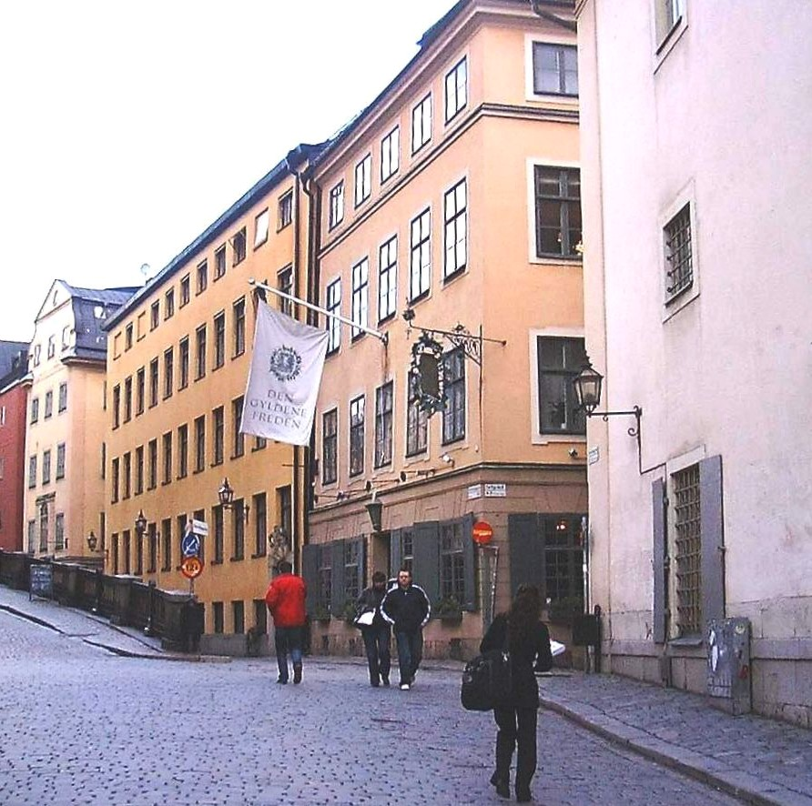 Old restaurant Den Gyldene Freden at 51, Österlånggatan in Gamla stan, Stockholm.